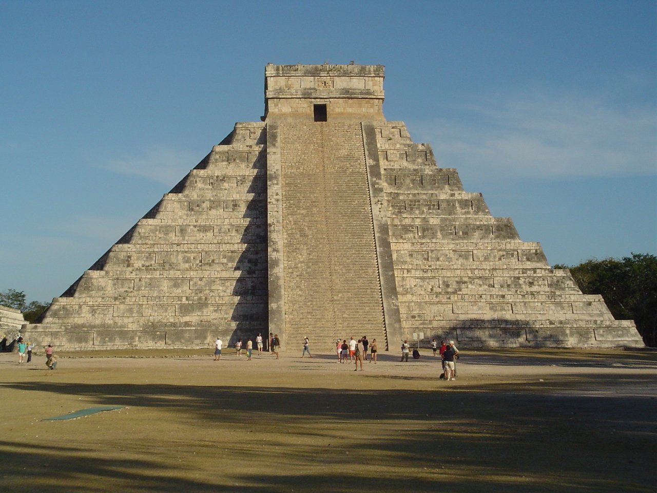 Die Pyramide in Chichen Itza, 11. Februar 2005 (selbst aufgenommen) Att309 16:57, 24. Feb 2005 (CET)